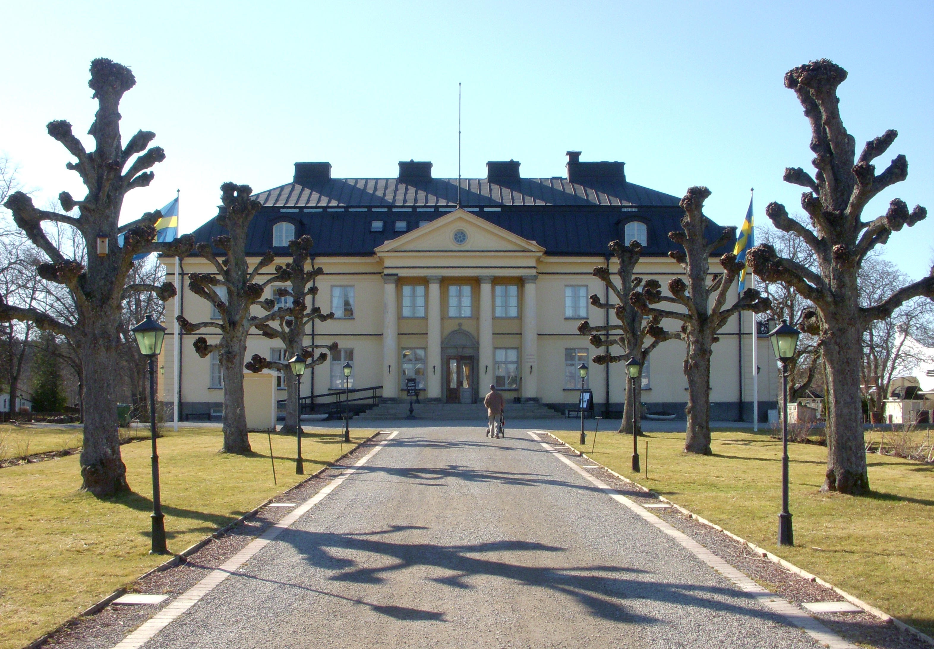 Hågelby gård huvudbyggnad fasad mot öst